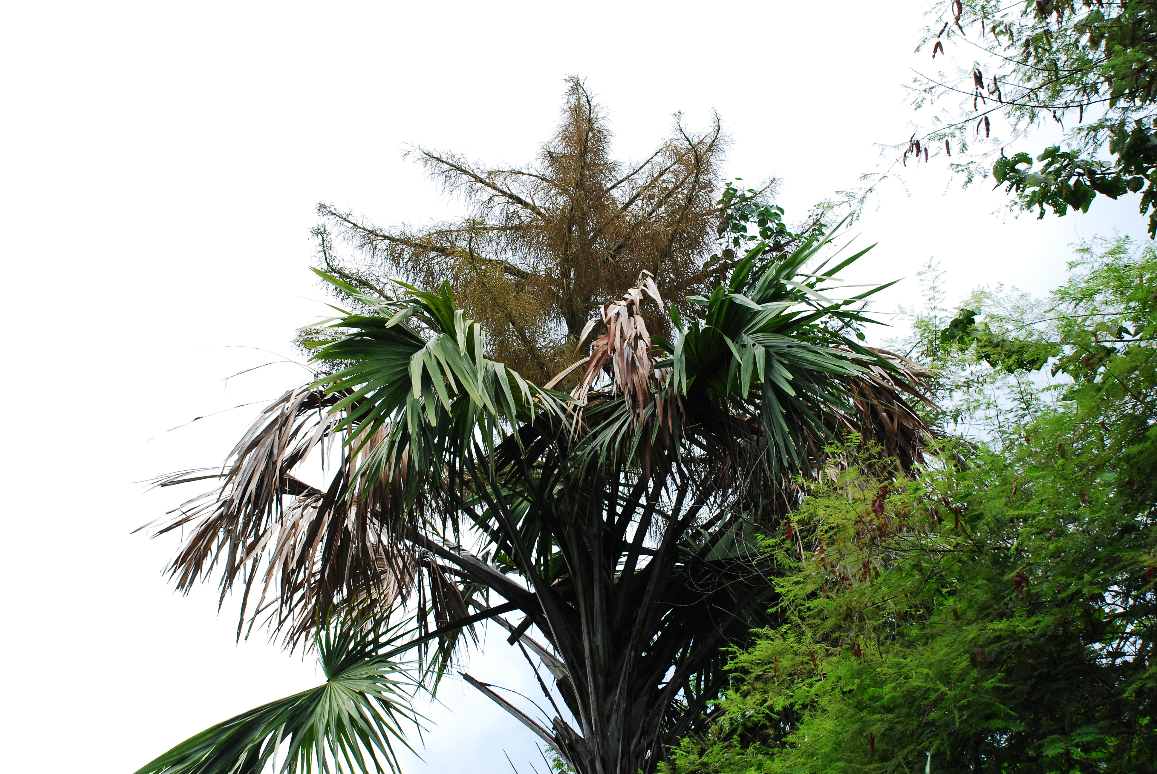 ต้นลานออกดอก ช่วงเดือนกันยายน 2552 ซึ่งเป็นปีหนึ่งที่ต้นลานออกดอกมากที่สุด